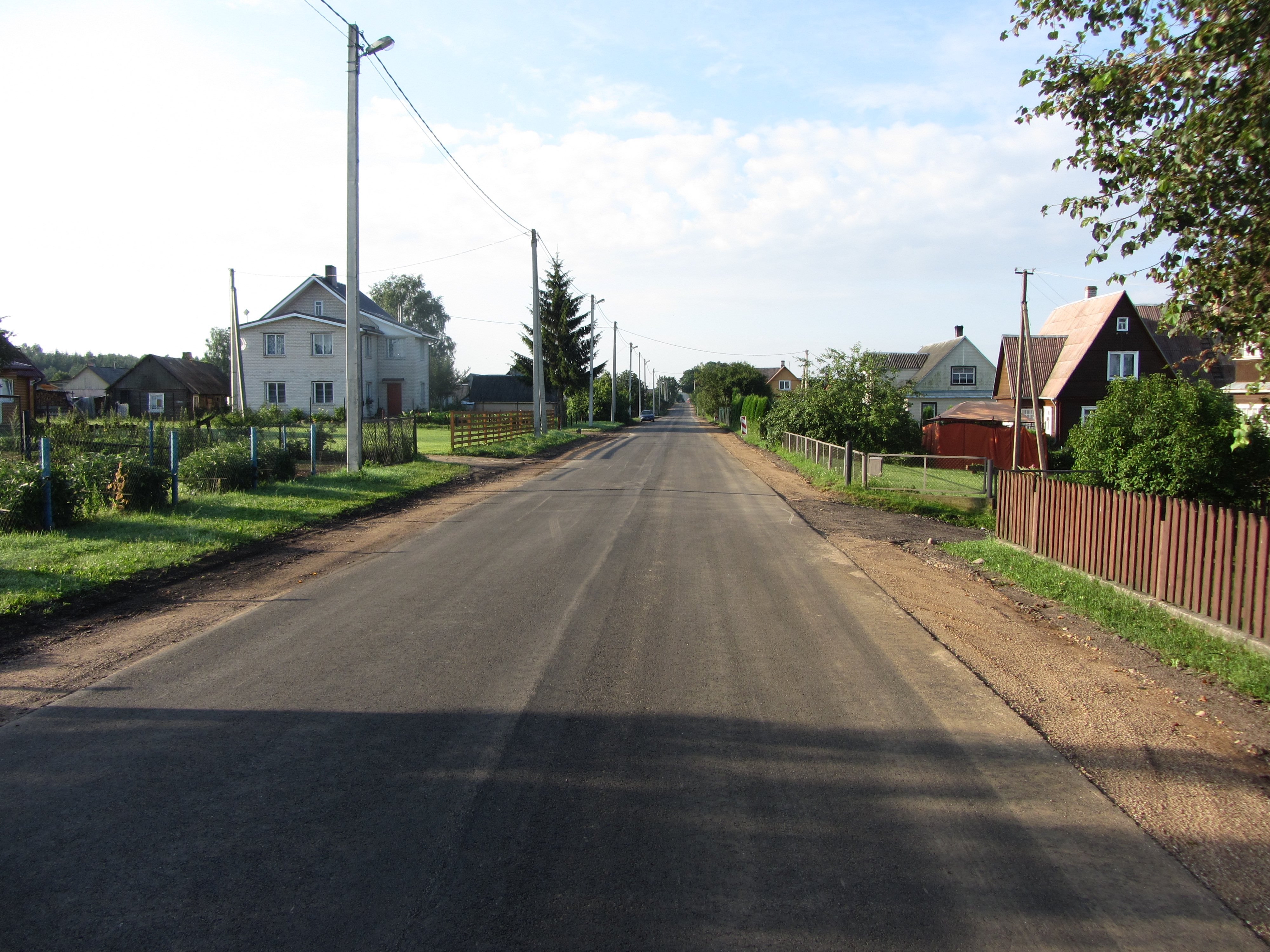 Paluknys, Lithuania